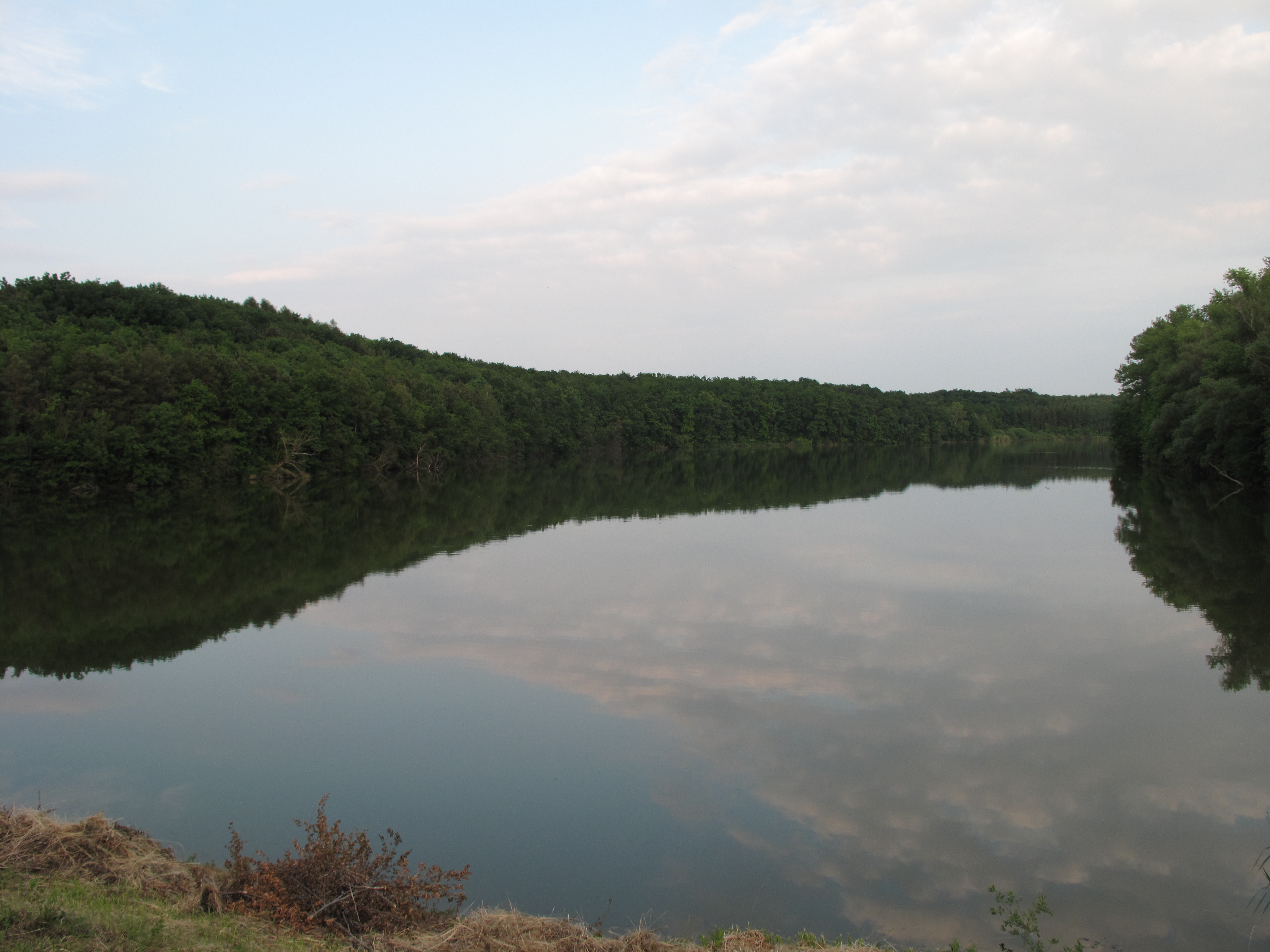 Vodní plocha Pustého rybníka. Okres Nymburk, Česká republika.